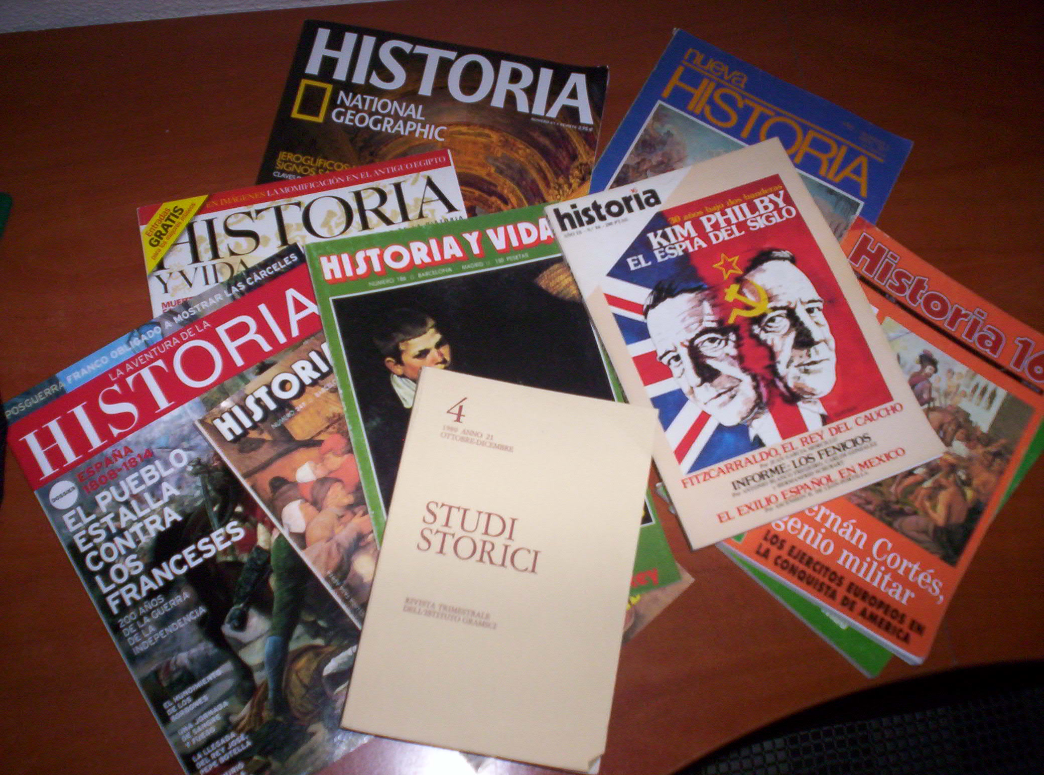 Montón de revistas de historia (pile of history rewievs)